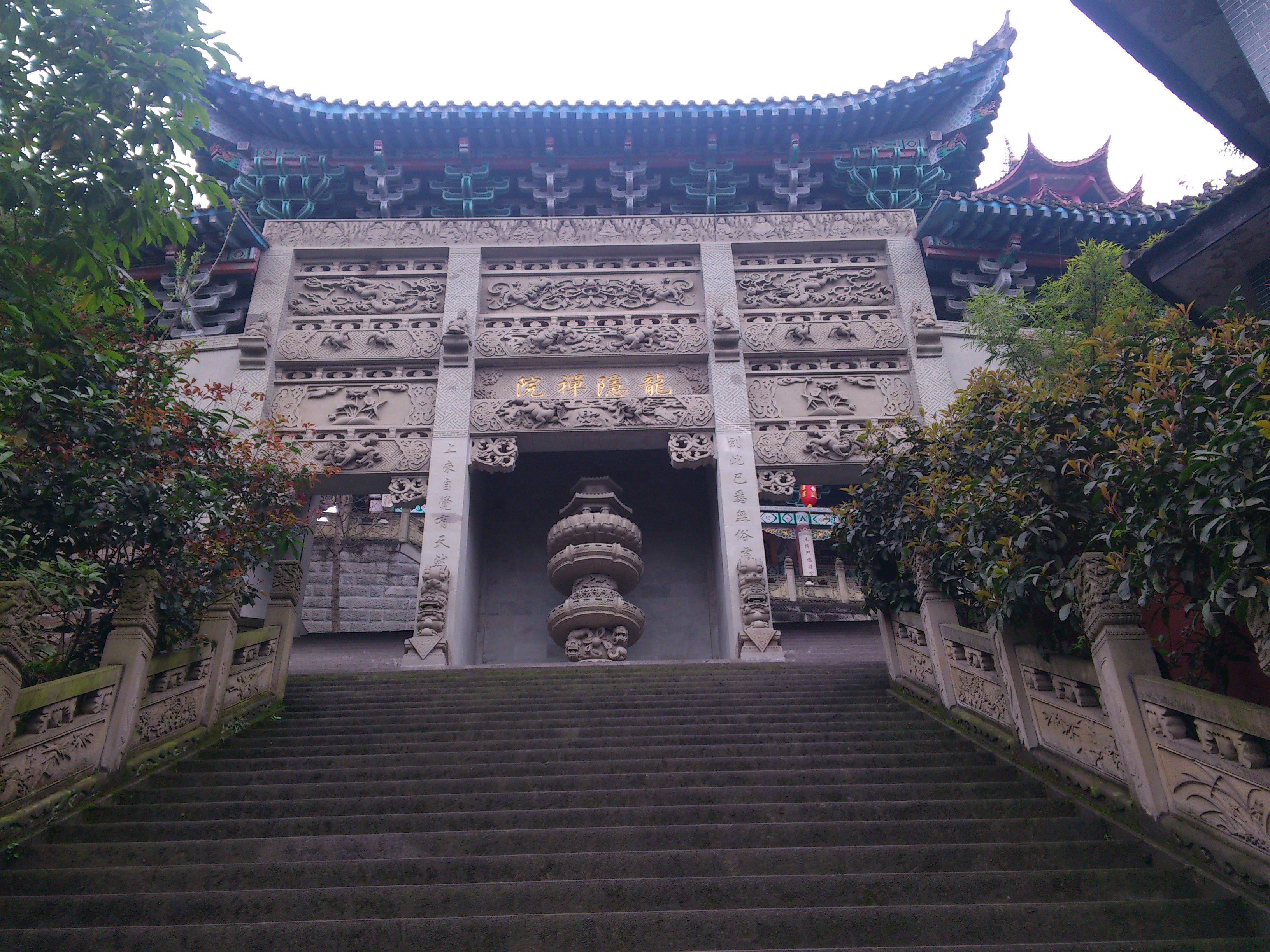 中文（中国大陆）: 宝轮寺大门处龙隐禅寺牌坊